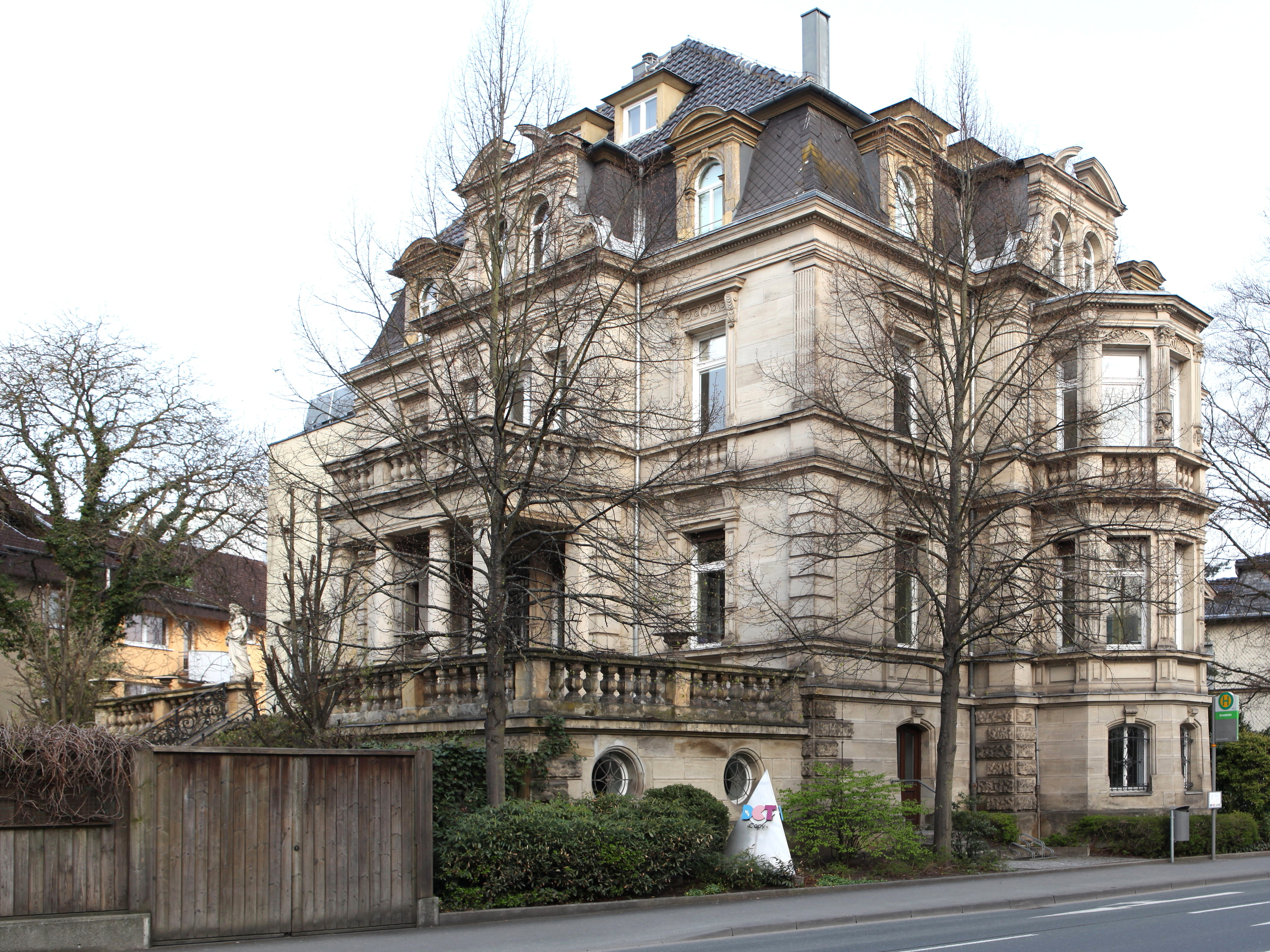 Süd-Ost-Fassade, Ernstplatz 8 in Coburg